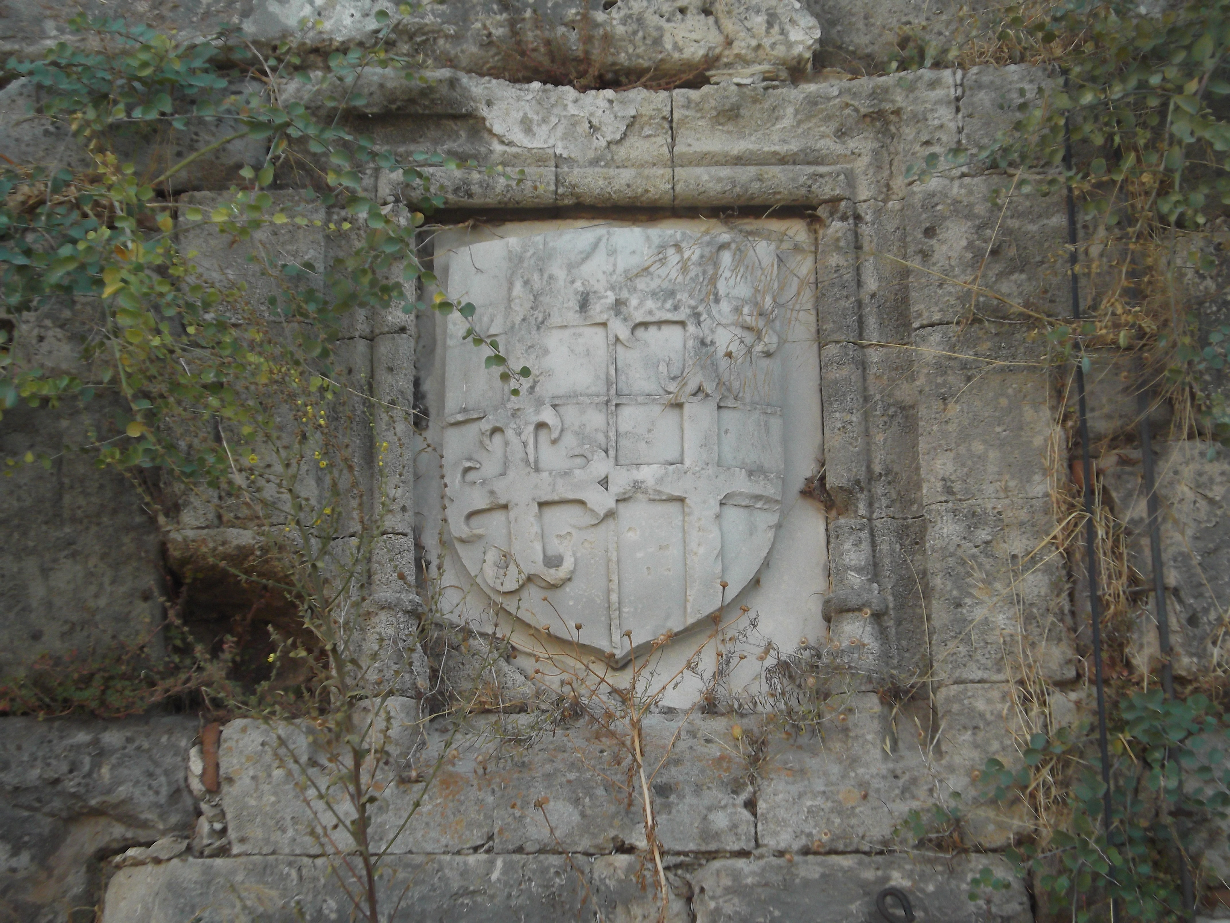 Ο Θυρεός του Μεγάλου Μαγίστρου των Ιωαννιτών Ιπποτών, Πιερ Ντ' Ομπισόν στο κάστρο της Νεραντζιάς της Κω